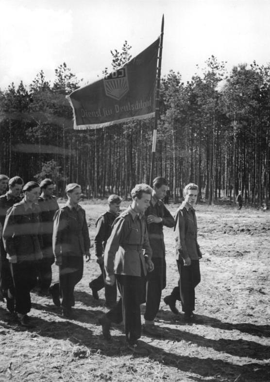 Zentralbild Heilig 16.9.1952 Hei-Ho. Lager des "Dienst für Deutschland" feierlich eröffnet. Am Sonntag, dem 14.9.1952 wurden Lager der Organisation "Dienst für Deutschland" feierlich eröffnet. Unsere Bilder zeigen die Eröffnung eines Lagers im Kreis Pasewalk. UBz: Nach der feierlichen Eröffnung. -Die beste Gruppe des Lagers mit der Wanderfahne des Zentralrates für gute Arbeit vom "Dienst für Deutschland."